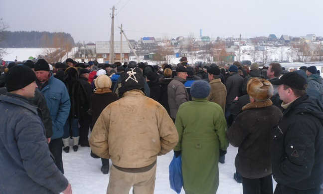 Собрание членов дачных товариществ в Смолевичском районе